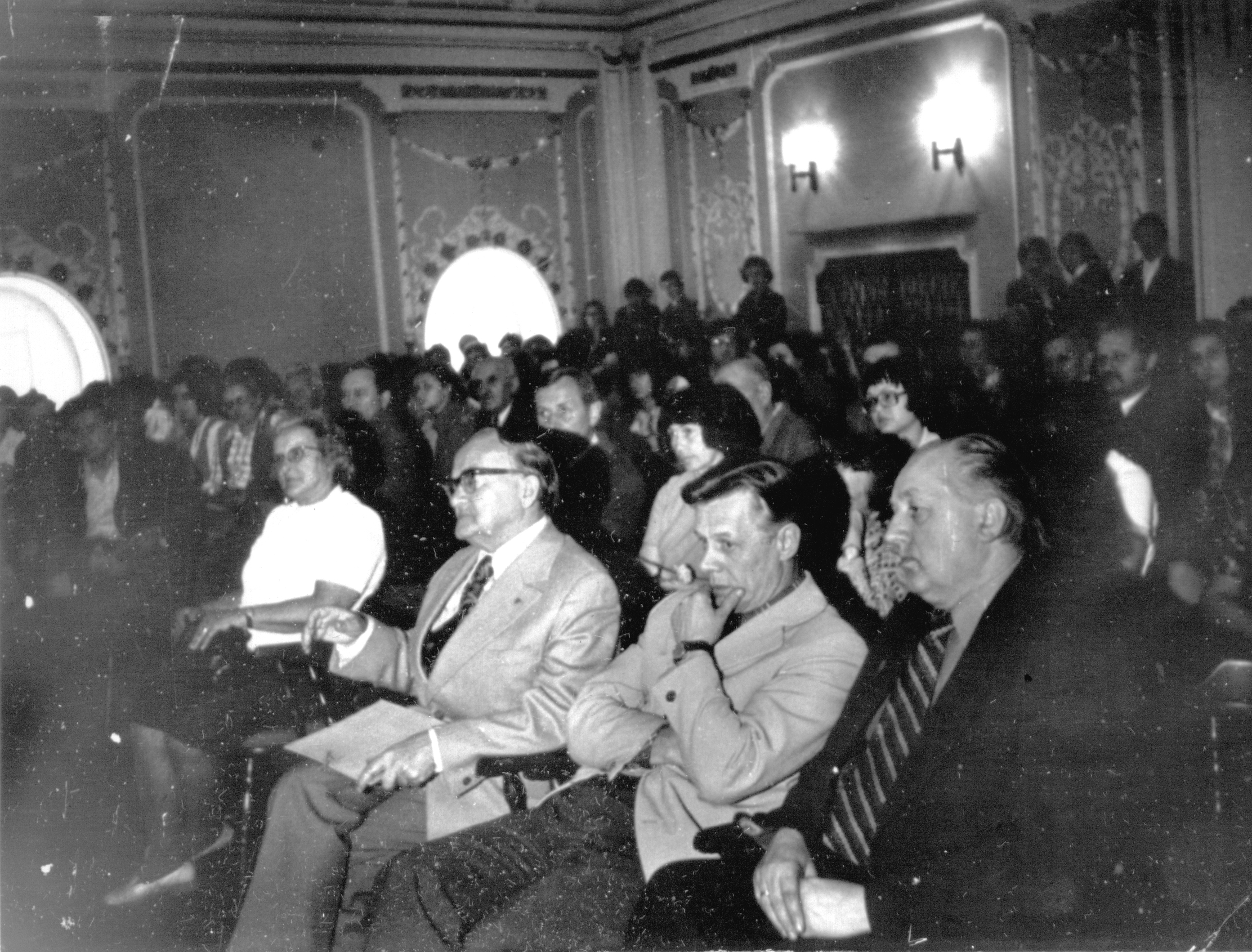 Mieczysław Woźniakowski (trzeci z prawej) i Zdzisław Konicki (pierwszy z prawej) zdjęcie 1976 fot M Z Wojalski